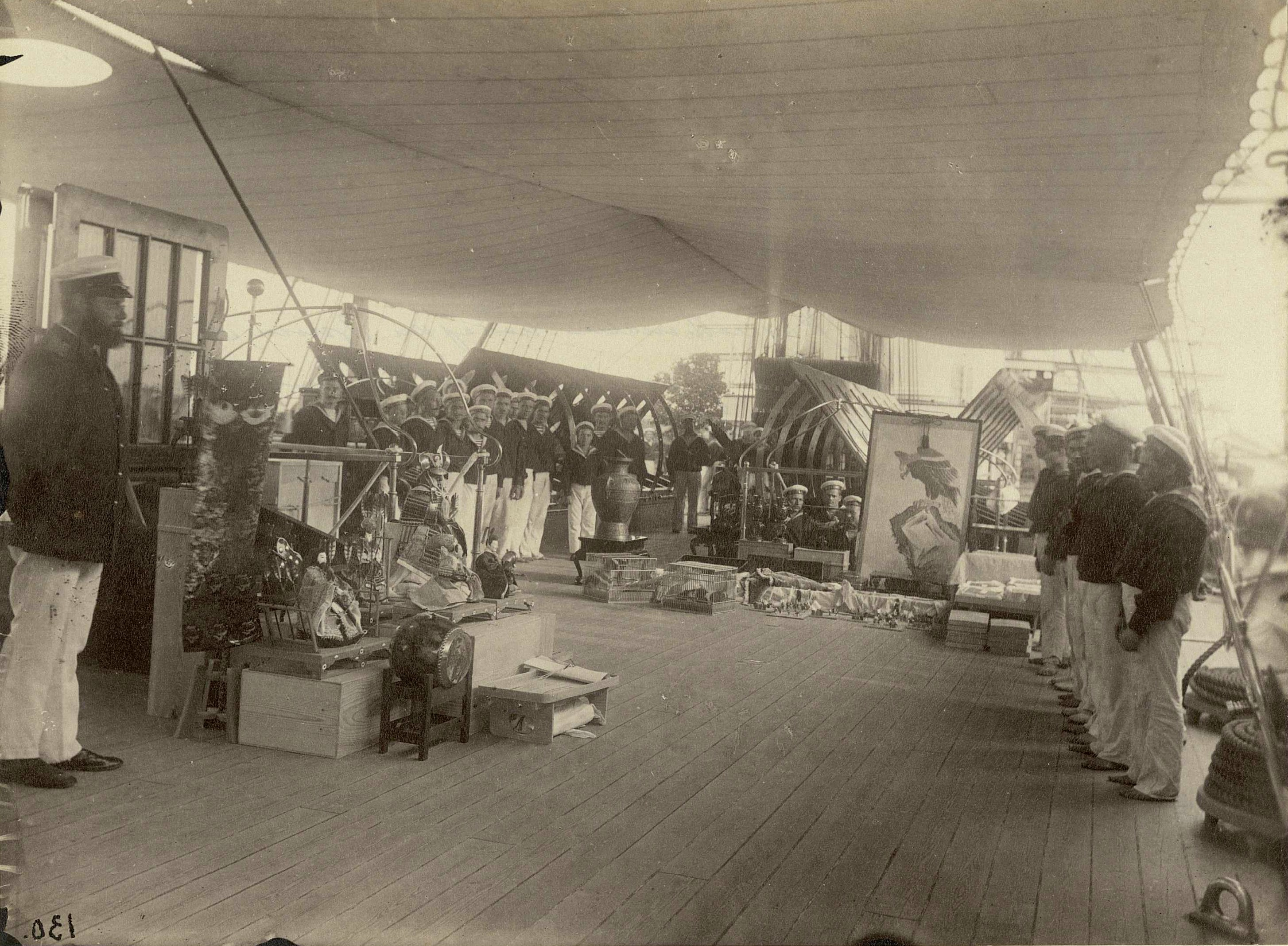 Подарки для цесаревича Николая Александровича, погруженные на крейсер "Память Азова"